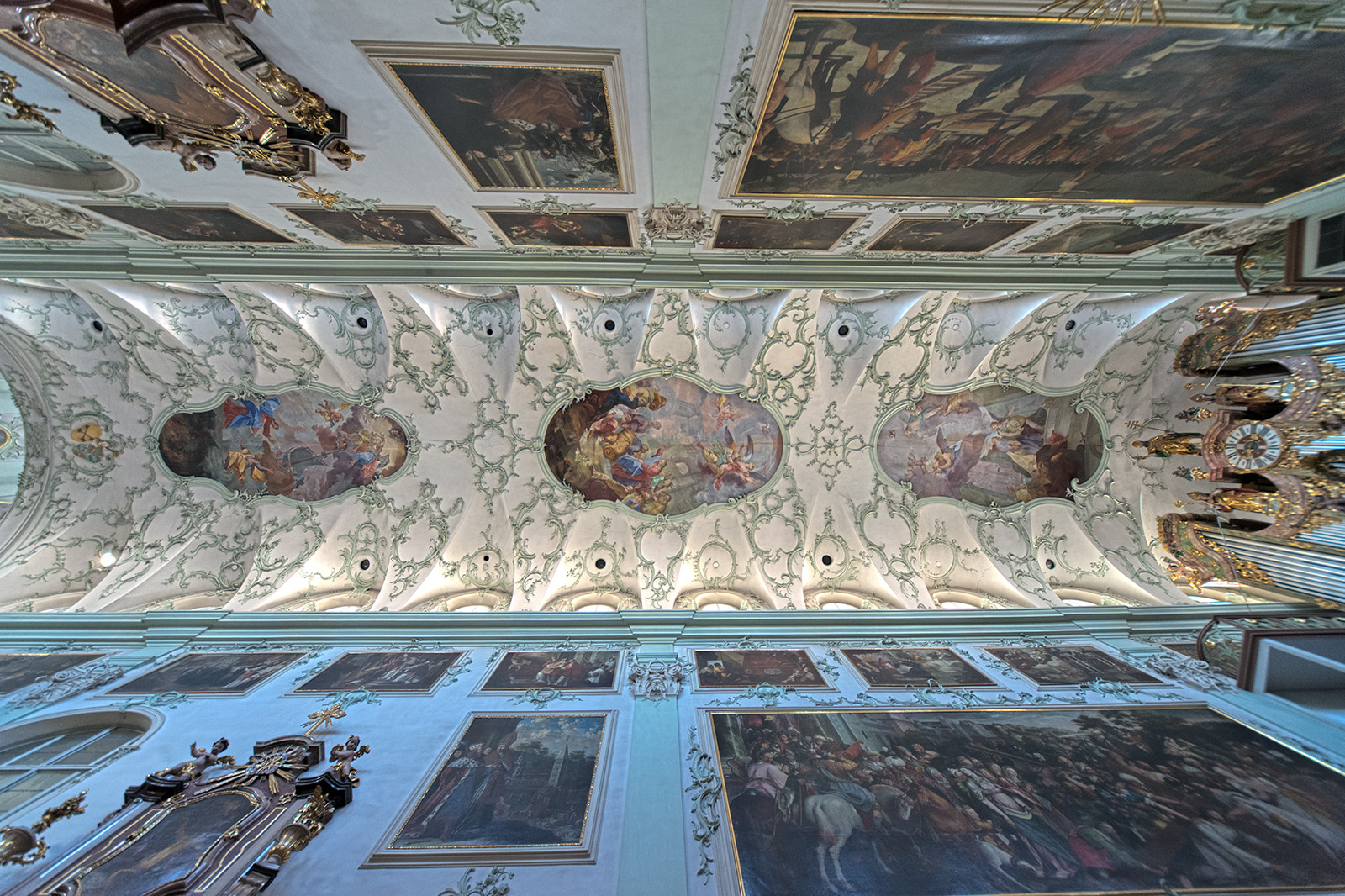 St Peter's Church (HDR)